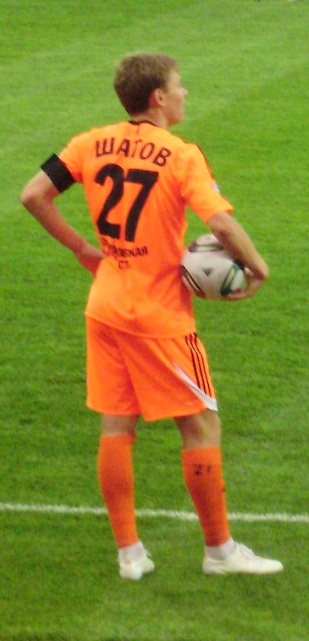 Олег Шатов 12 сентября 2011 года во время матча 27 тура ФНЛ "Урал"-"Алания"